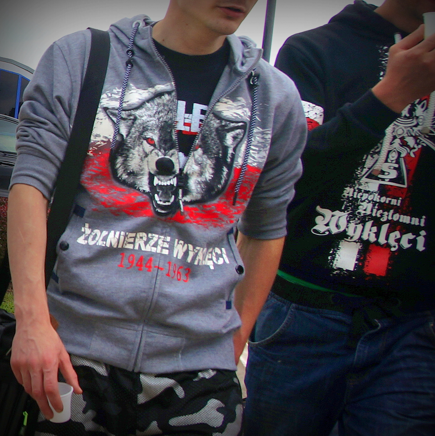 Koszulki, bluzy jako odzież tzw.patriotyczna (bądź uliczna) z graficznymi motywami nawiązującymi do historii Polski